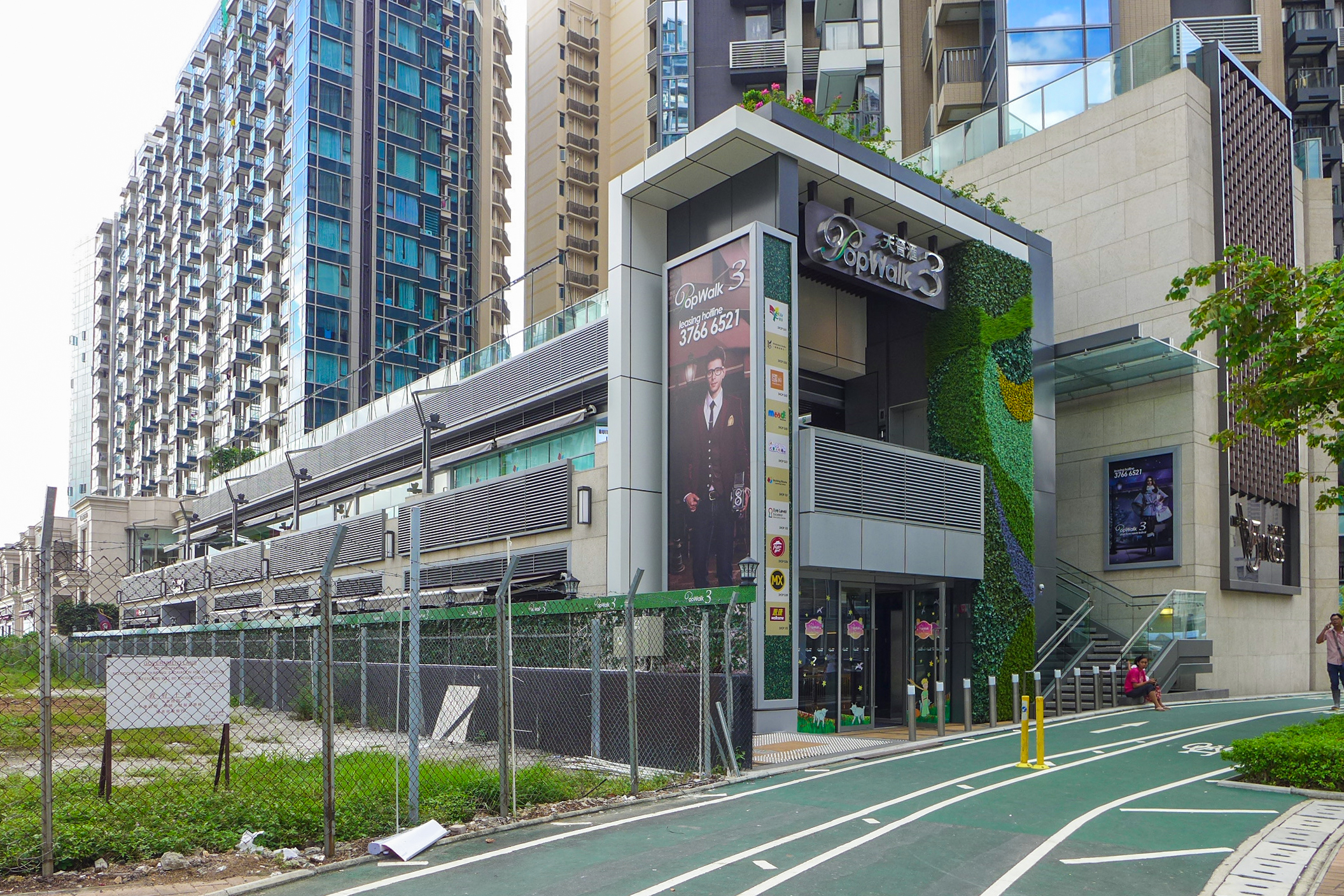 Popwalk 3